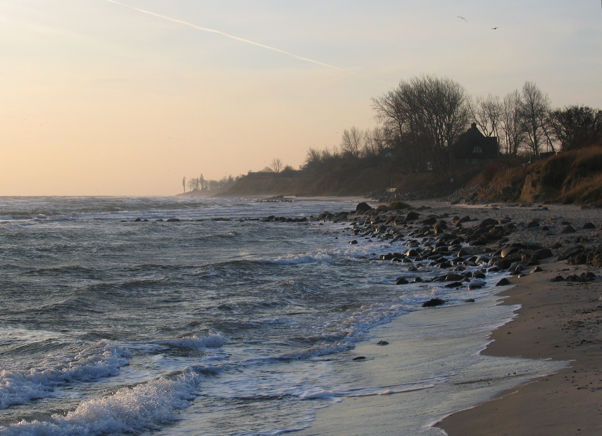 Dahme, Ostseestrand, Herbststimmung, Blickrichtung Dahmeshöved, Haus Sonne und Meer, Gelände der DJH, Seefrieden im Hintergrund